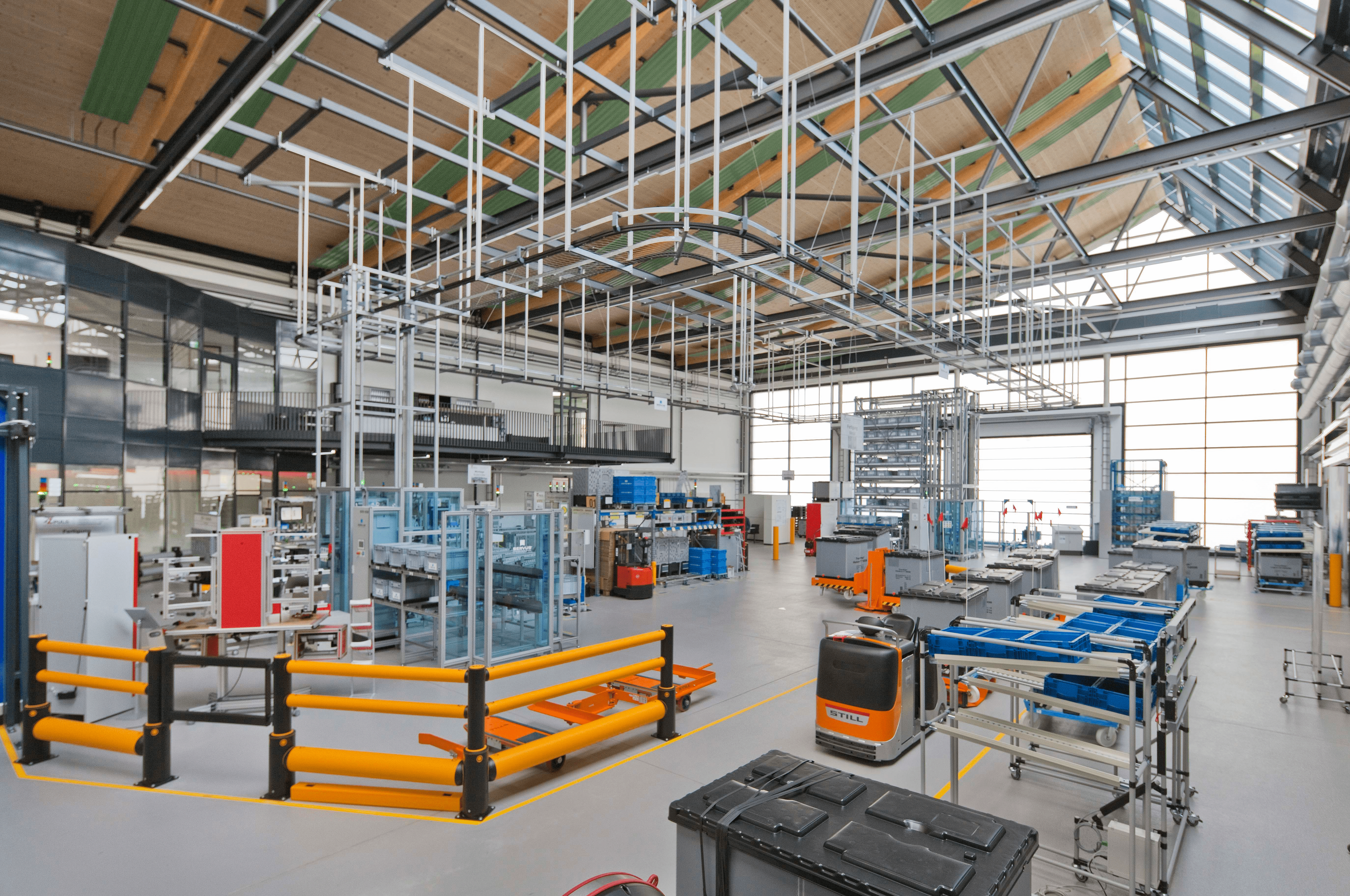 TZ PULS Musterfabrik